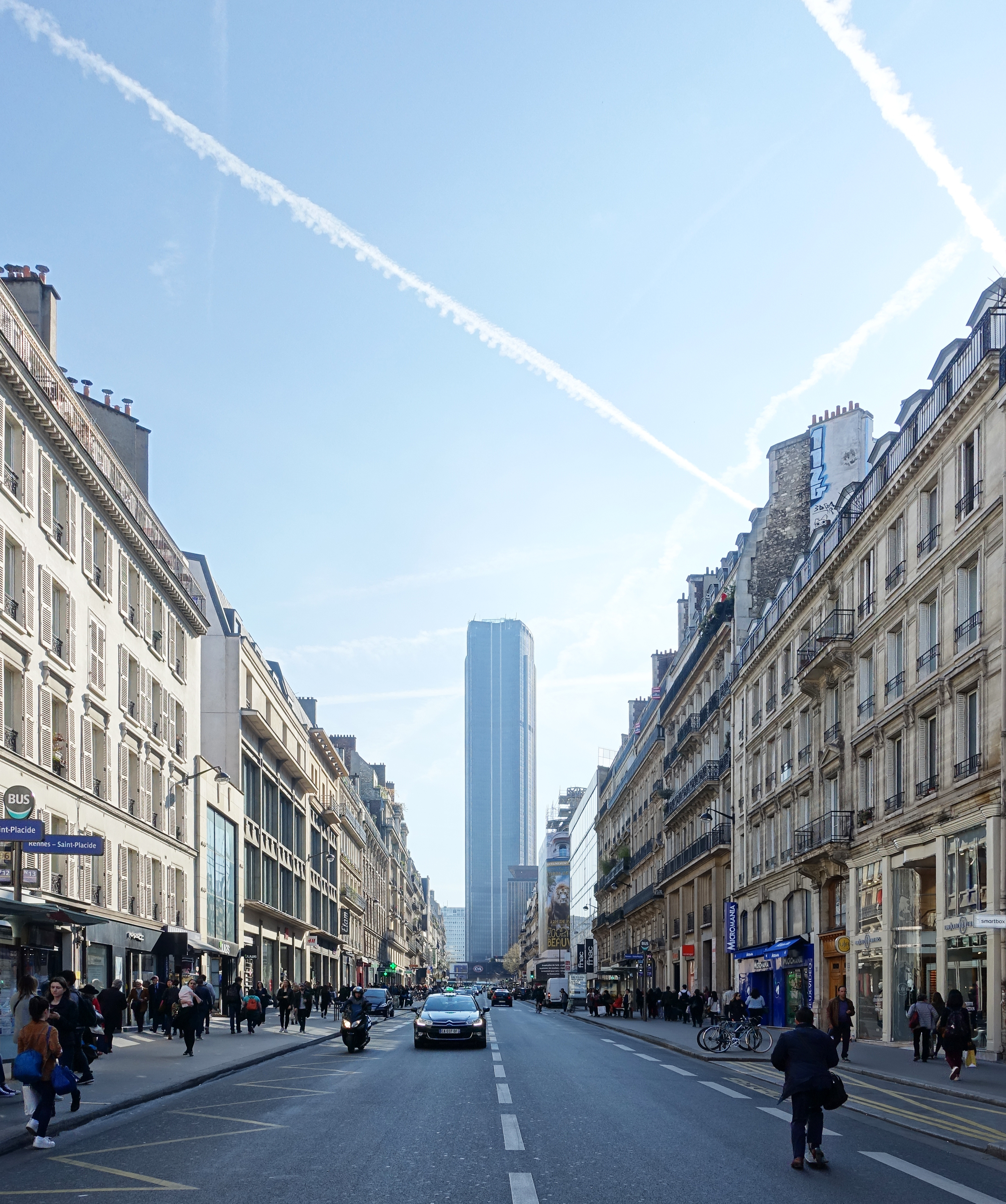 Tour Montparnasse @ Rue de Rennes @ Paris